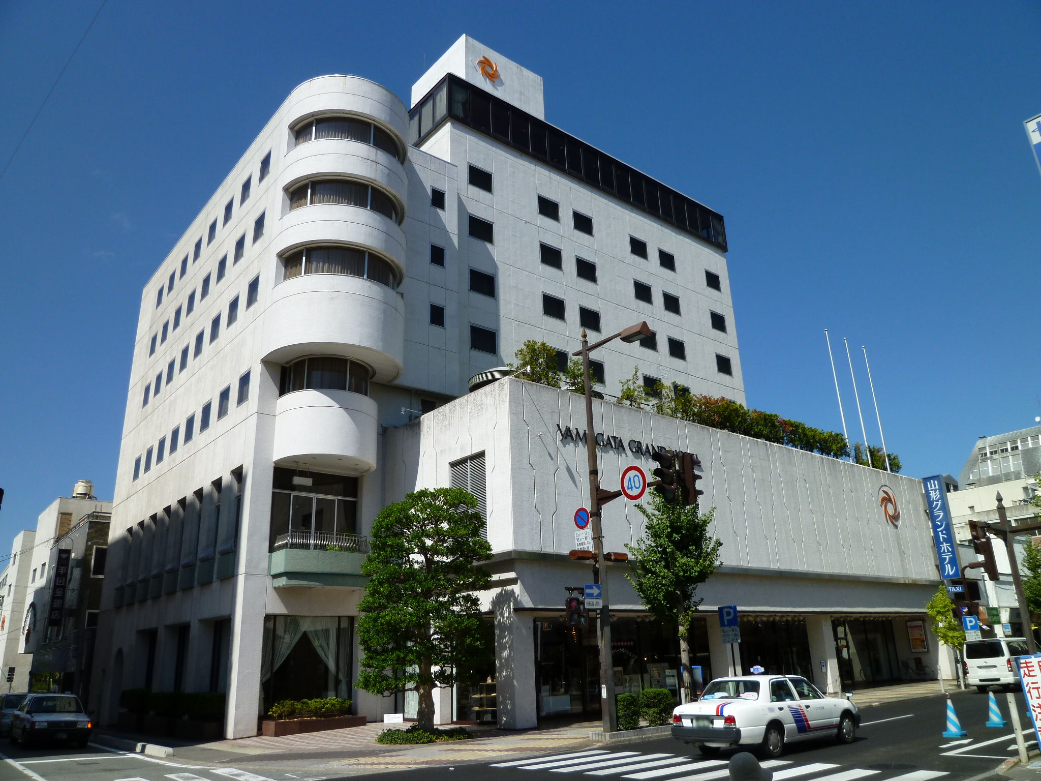 山形グランドホテル（山形県山形市）